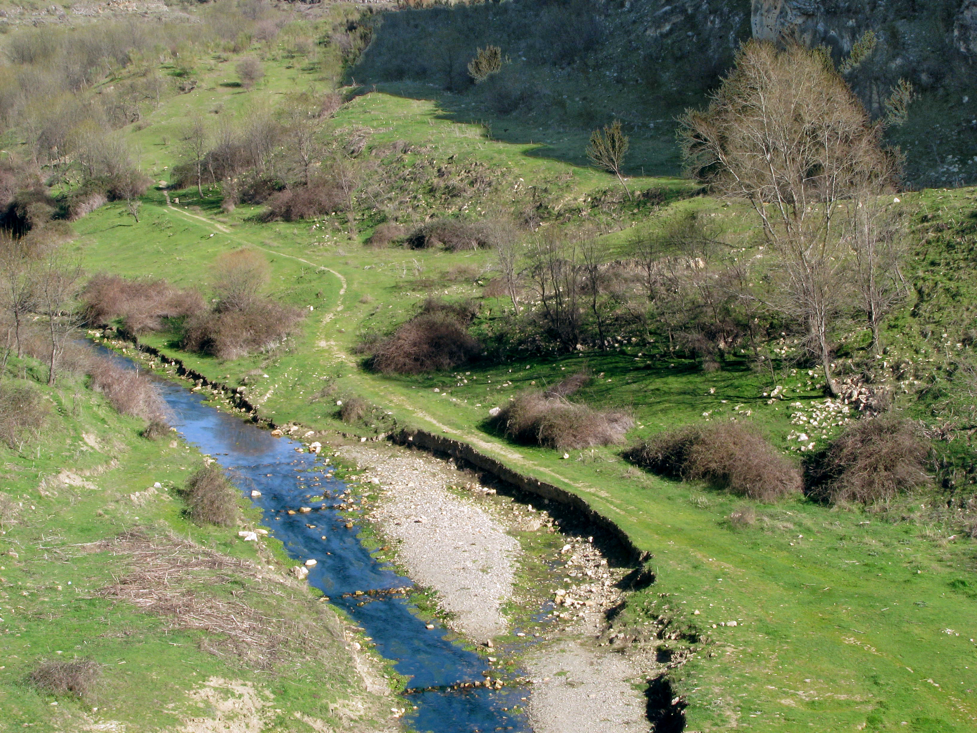 Río Lozoya a su paso por el Pontón de la Oliva, España.